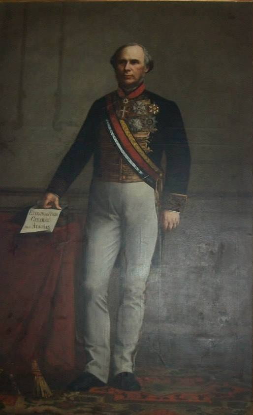 João Lins Vieira Cansanção de Sinimbu, o Visconde de Sininmbu.